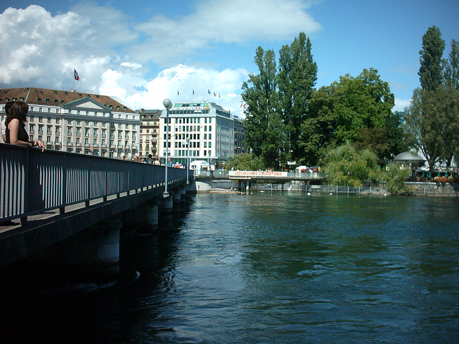 Pont des Bergues et Île Rousseau à Genève (Suisse)